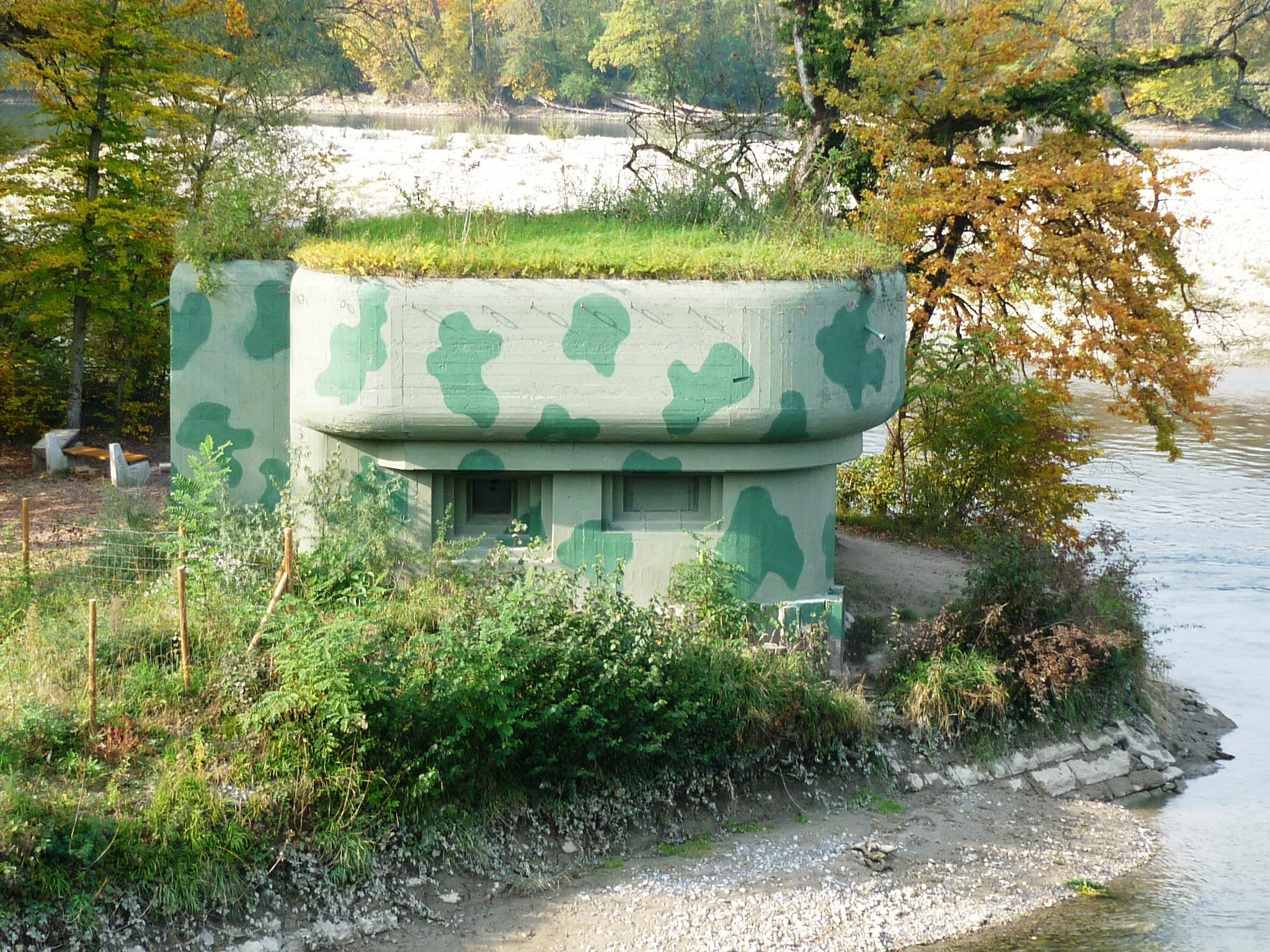 Maschinengewehrbunker, Wasserschloss AG, Schweiz